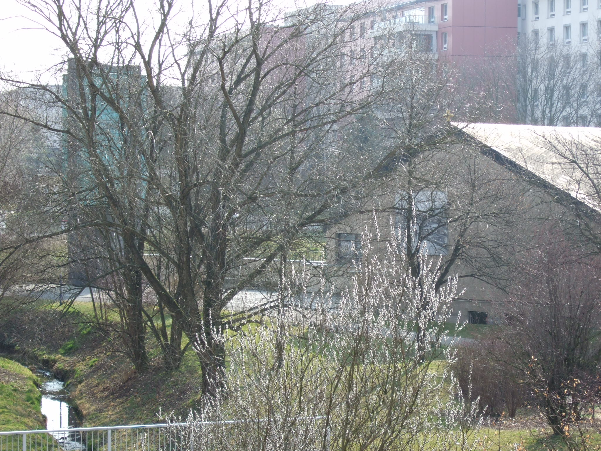 Geberbach, Glockenturm, Seniorenheim, Kirche in Prohlis im Frühling 2014